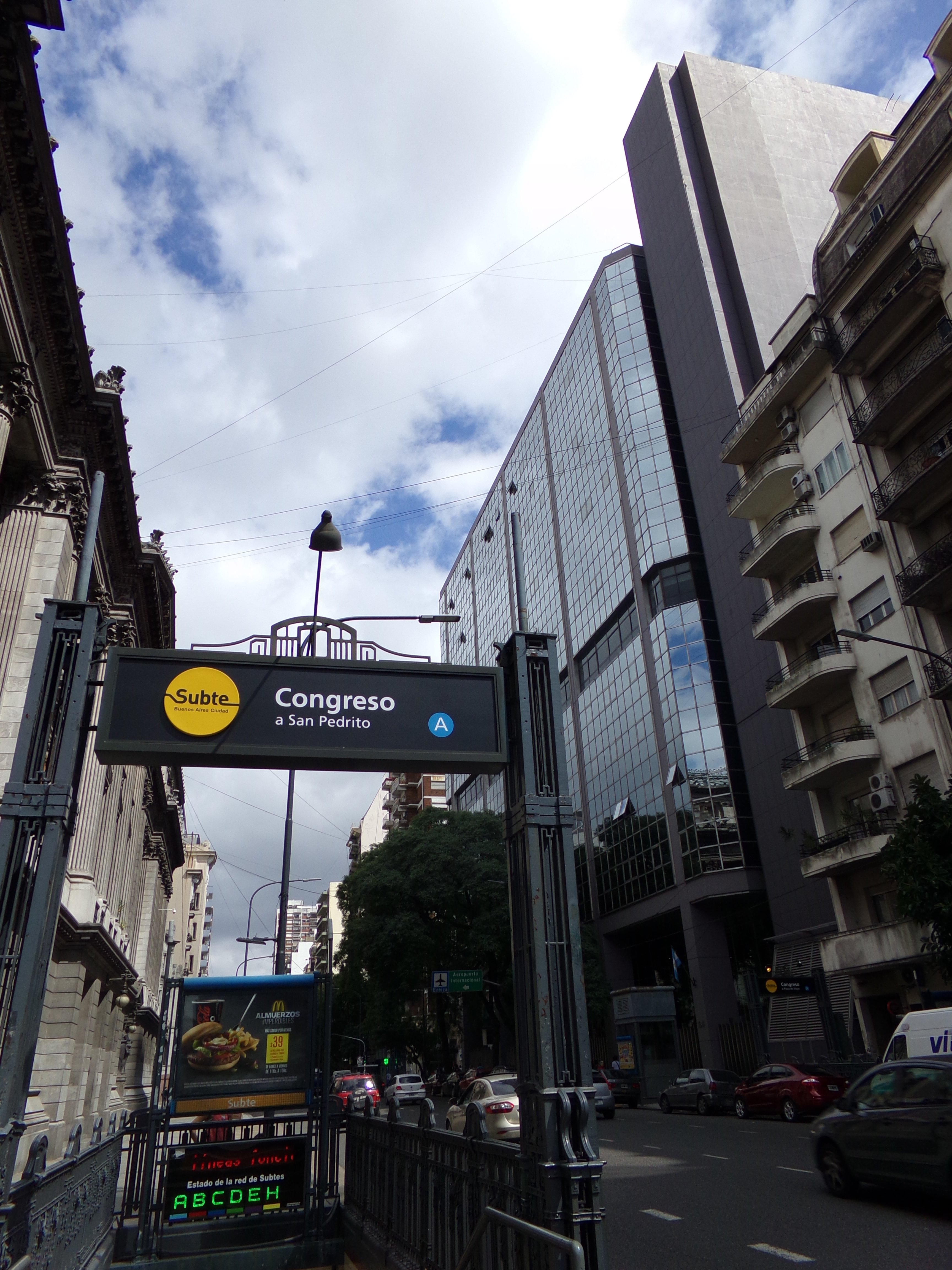 Estación Congreso, línea A